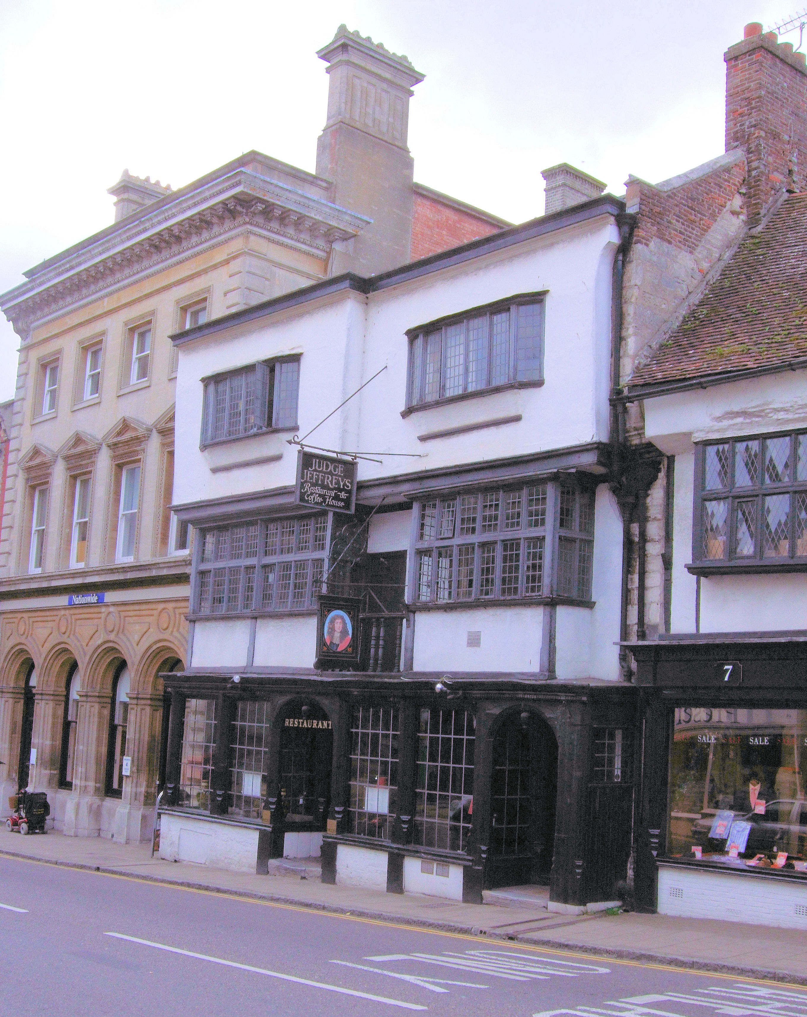 Judge Jeffreys Restaurant in Dorchester, Dorset.